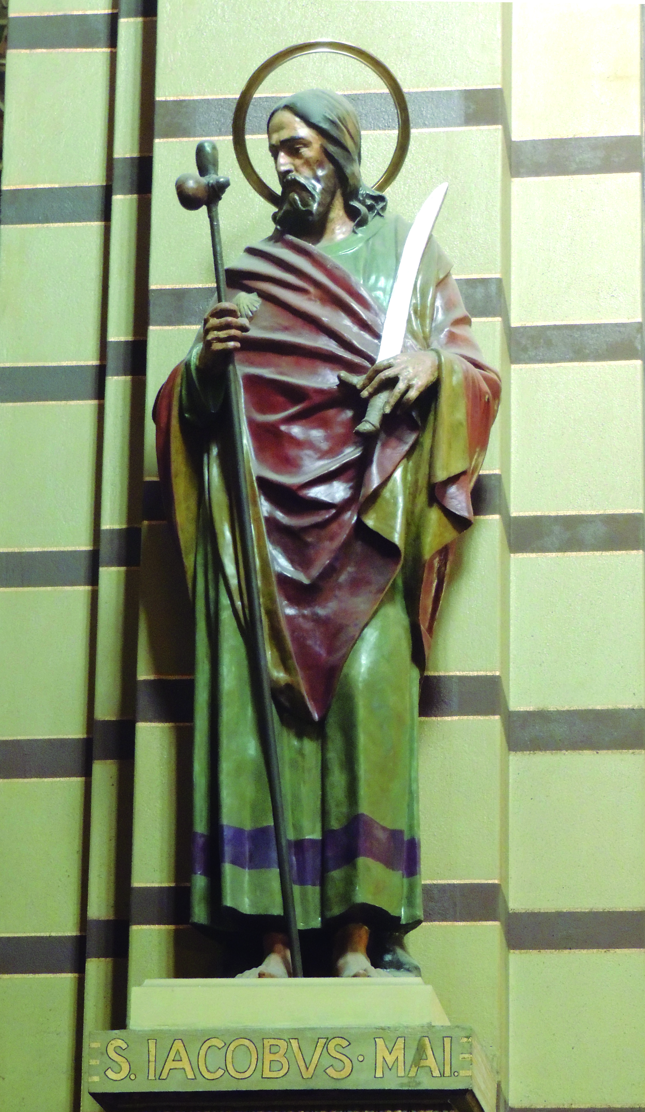 Integra um conjunto de estátuas da Basílica de Nossa Senhora da Assunção do Mosteiro de São Bento na cidade de São Paulo.Os apóstolos têm cerca de 2,80 m de altura, são feitos de gesso policromo e estão instalados na nave da igreja beneditina, a uma altura de aproximadamente 3,5 m. Moldadas por Van Emelen em seu ateliê no Palácio das Indústrias, São Paulo, entre 1920 e 1922, as estátuas teriam sido inauguradas no dia da consagração da basílica, em 1922.